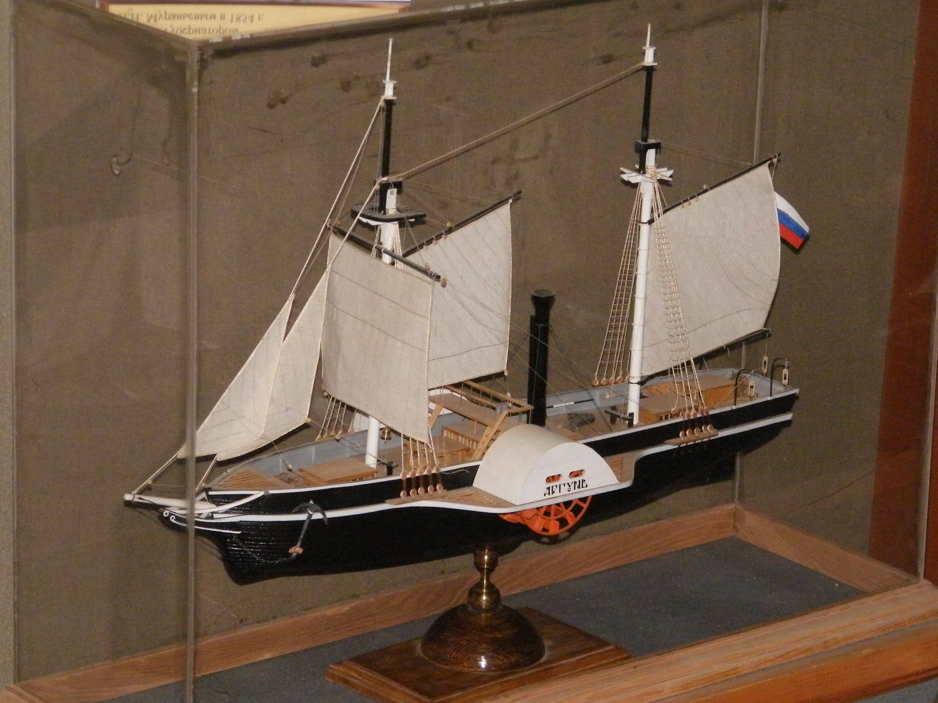 Модель парохода "Аргунь", Хабаровский краеведческий музей